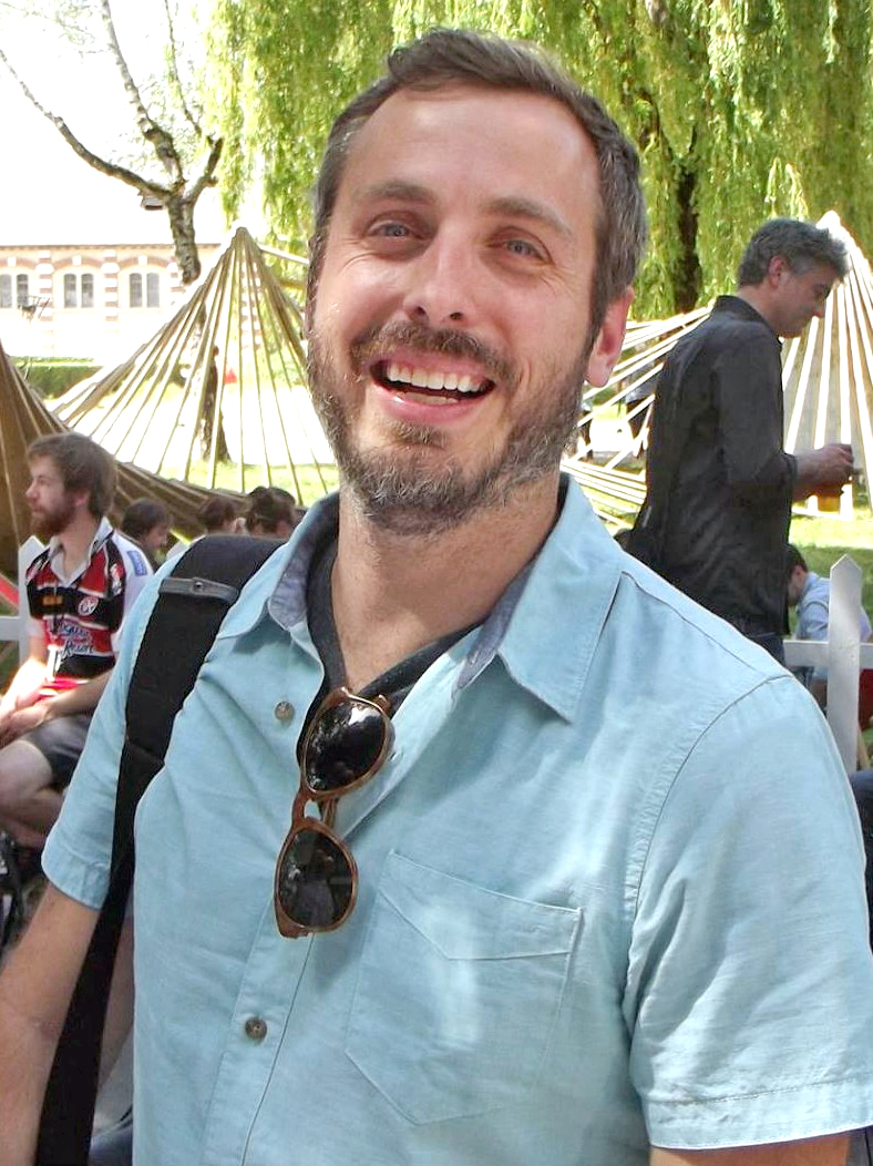 Patrick Osborne au Festival international du film d'animation d'Annecy 2014